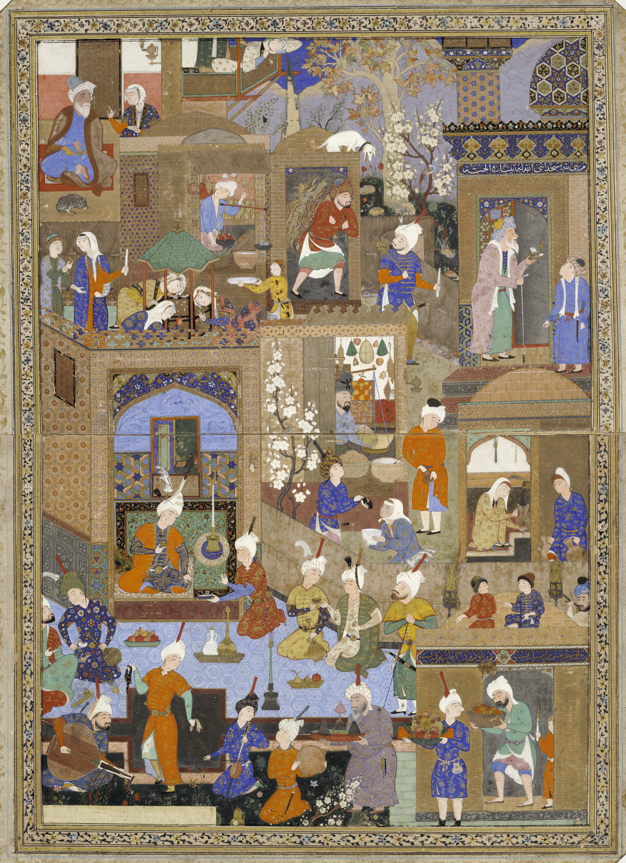 Мир Сеид Али Хамсе Низами. 1540 Британский музей 1